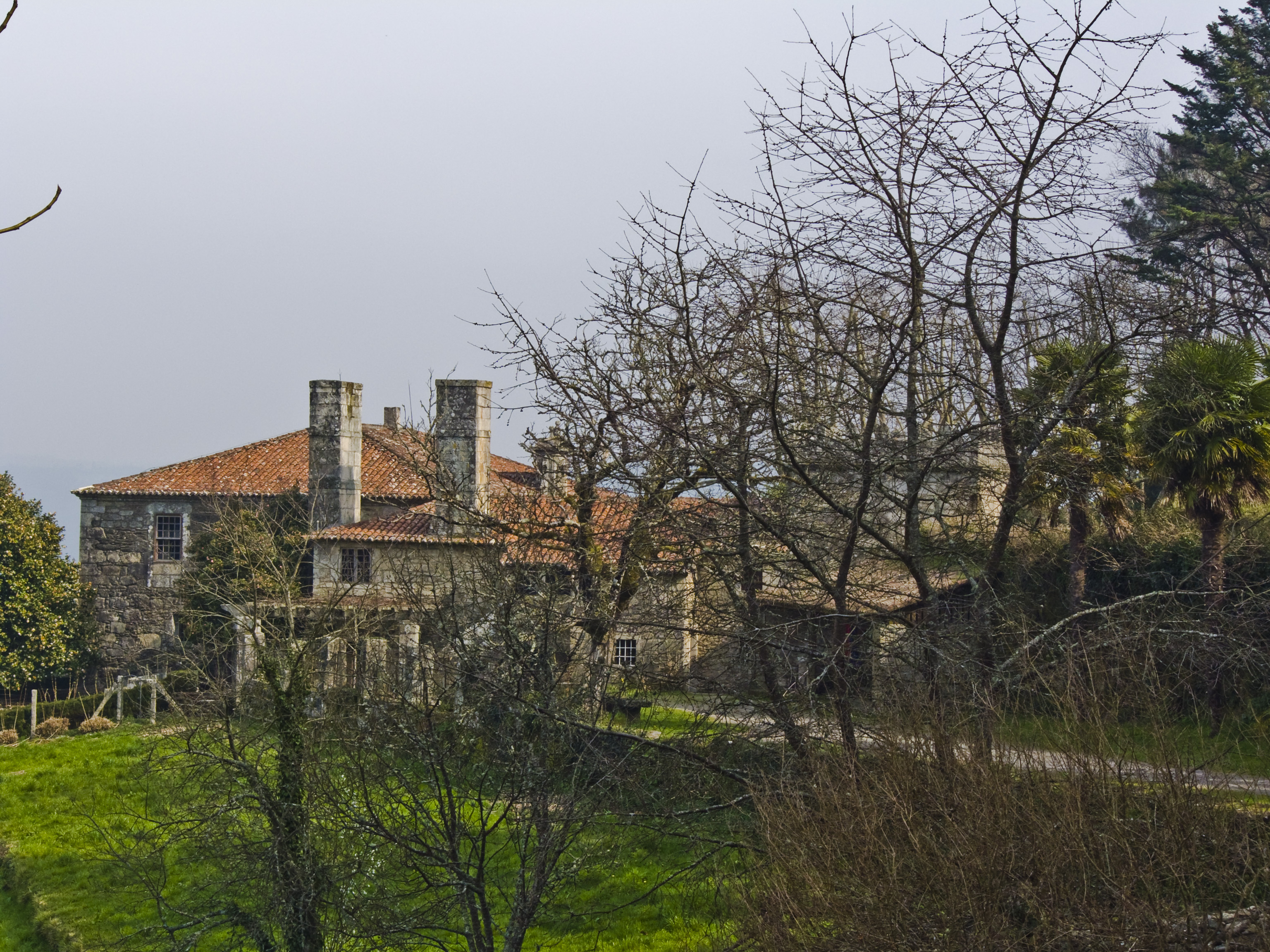 Se edificó en 1717 y ha sufrido reformas posteriores. Tienen una explotación de Manzanos golden... que llega hasta la Torre de Cira